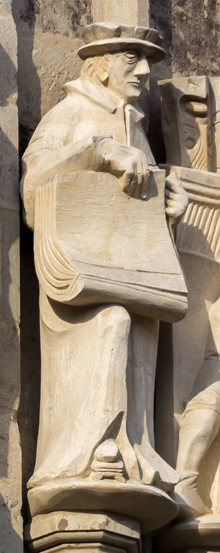 Rathausturm Köln mit der Status des Heinrich von Beeck. Bildhauer: Hans Karl Burgeff